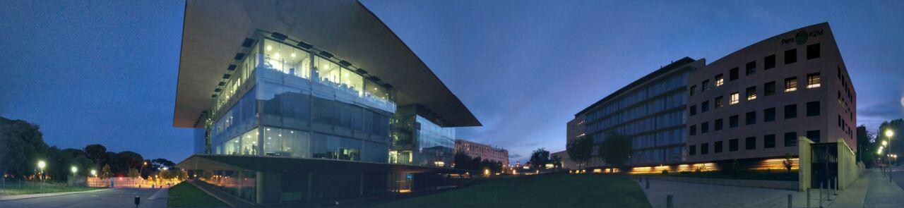 سراسر‌نمای کمپ شمالی دانشگاه UPC